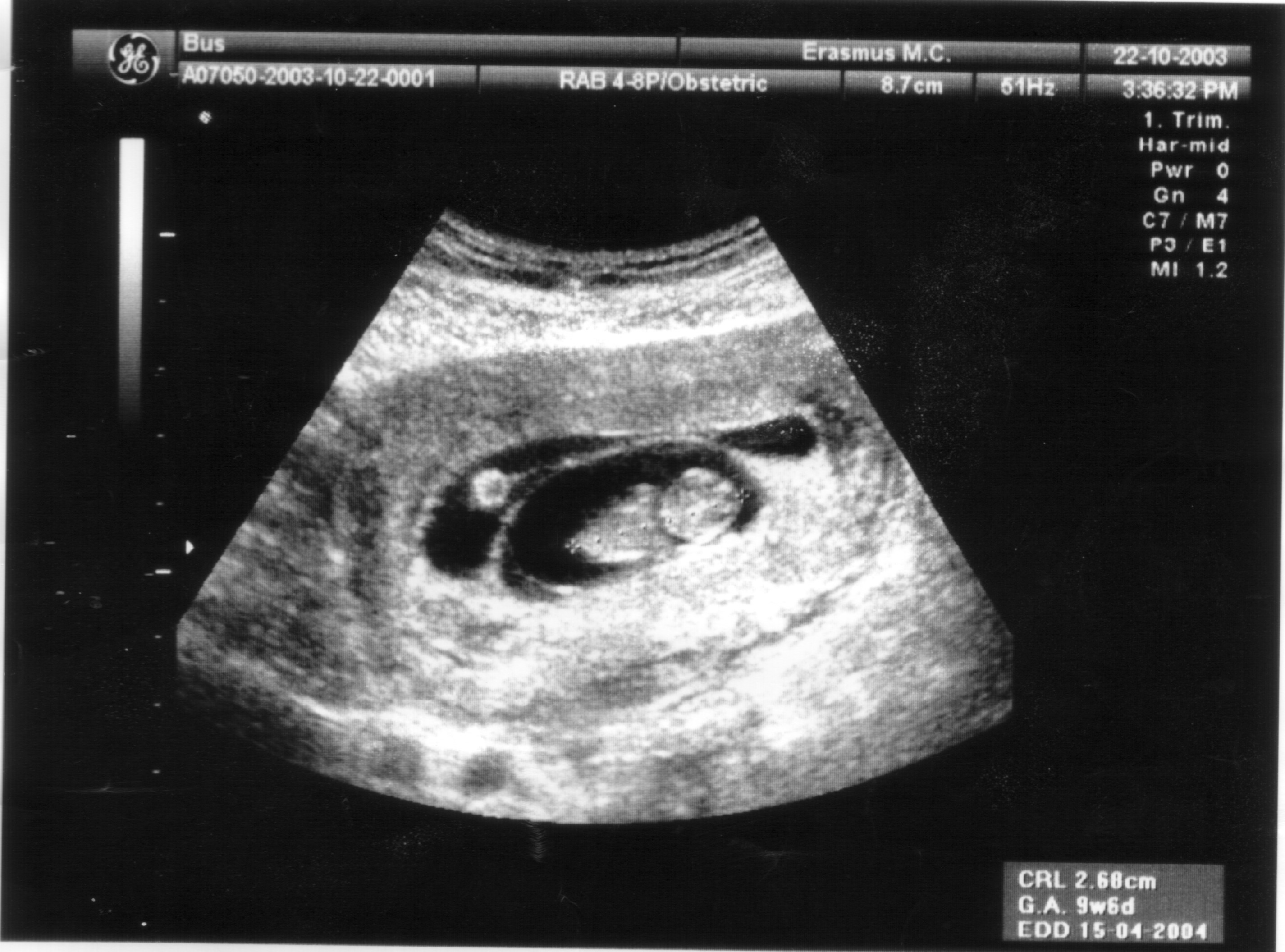 Echo gemaakt door mijzelf van m'n eigen tweeling